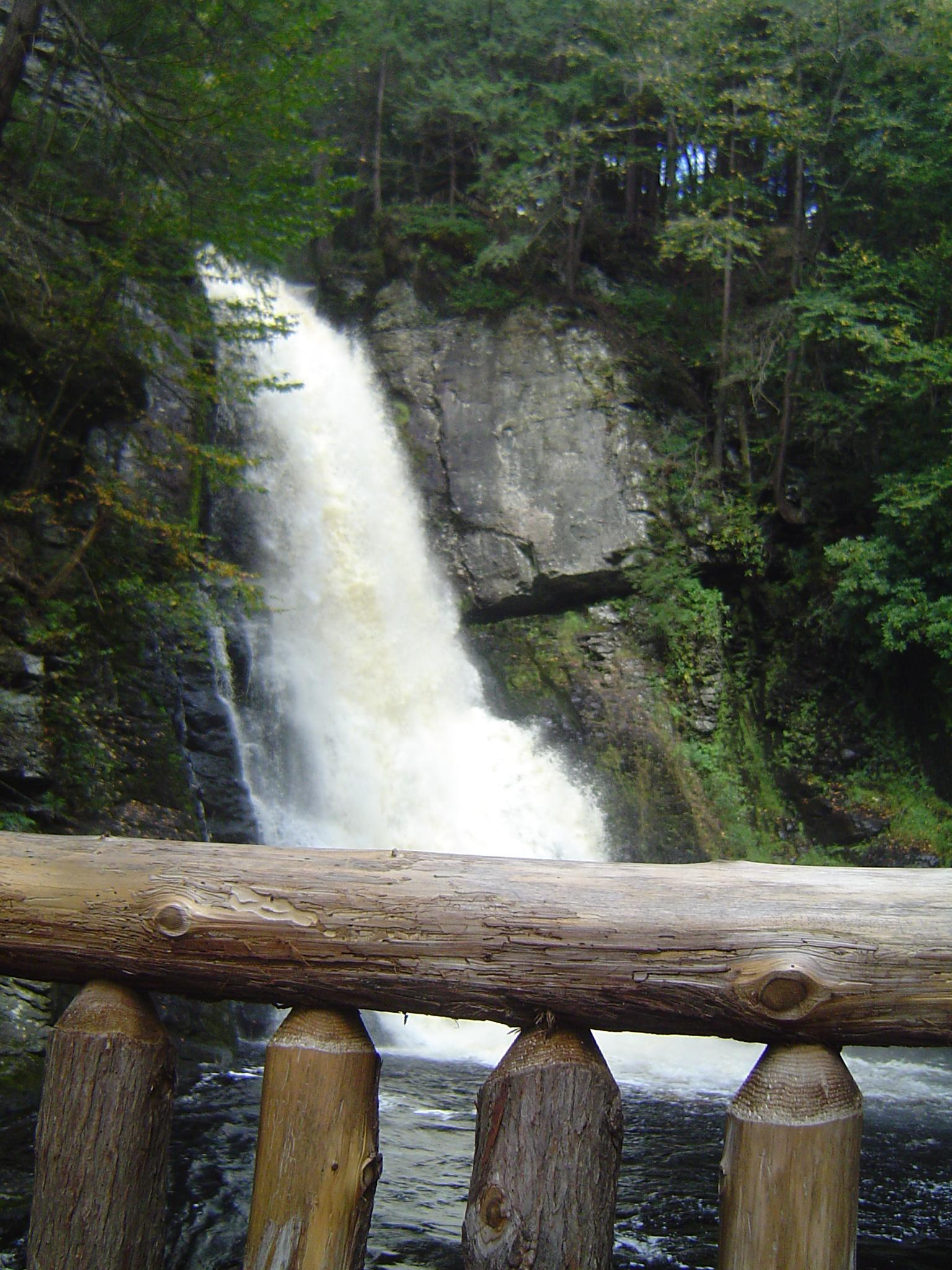 Bushkill Falls, Pennsylvania, USA